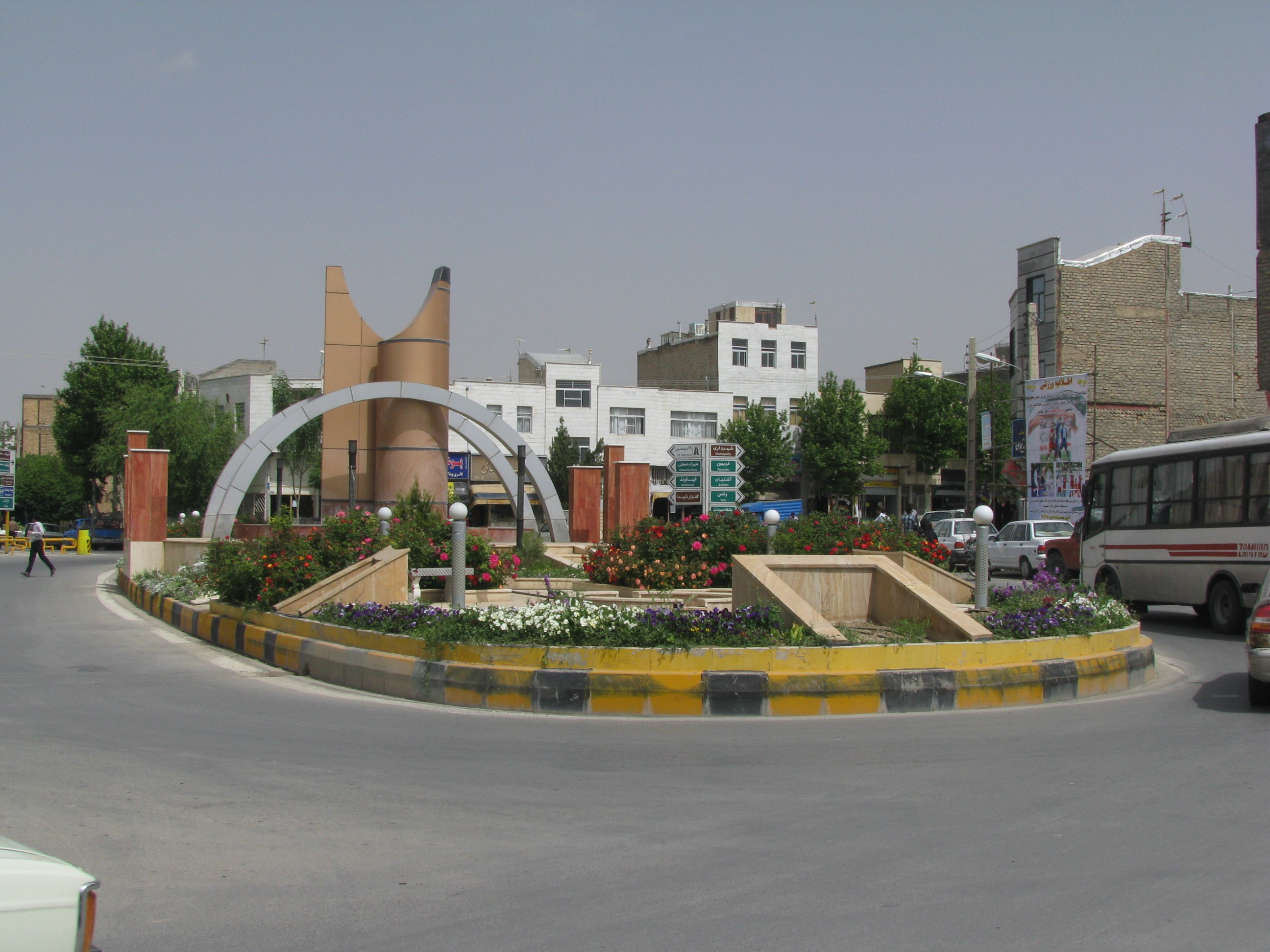 میدان معلم شهرستان کمیجان